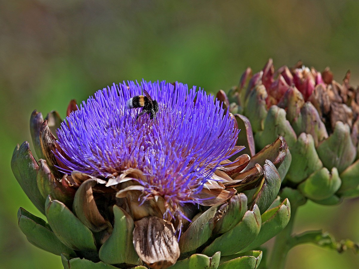 Hummel auf einer Artischockenblüte